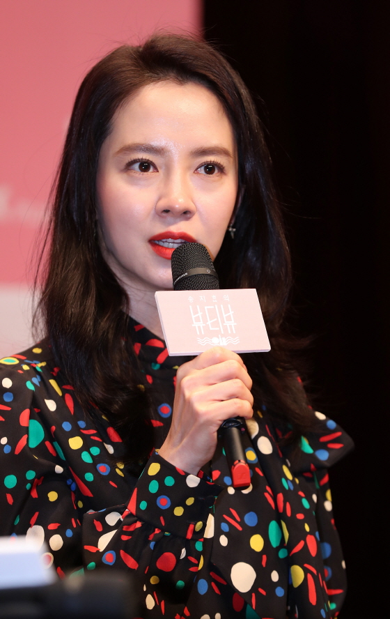 2017年1月18日宋智孝的Beauty View發佈會